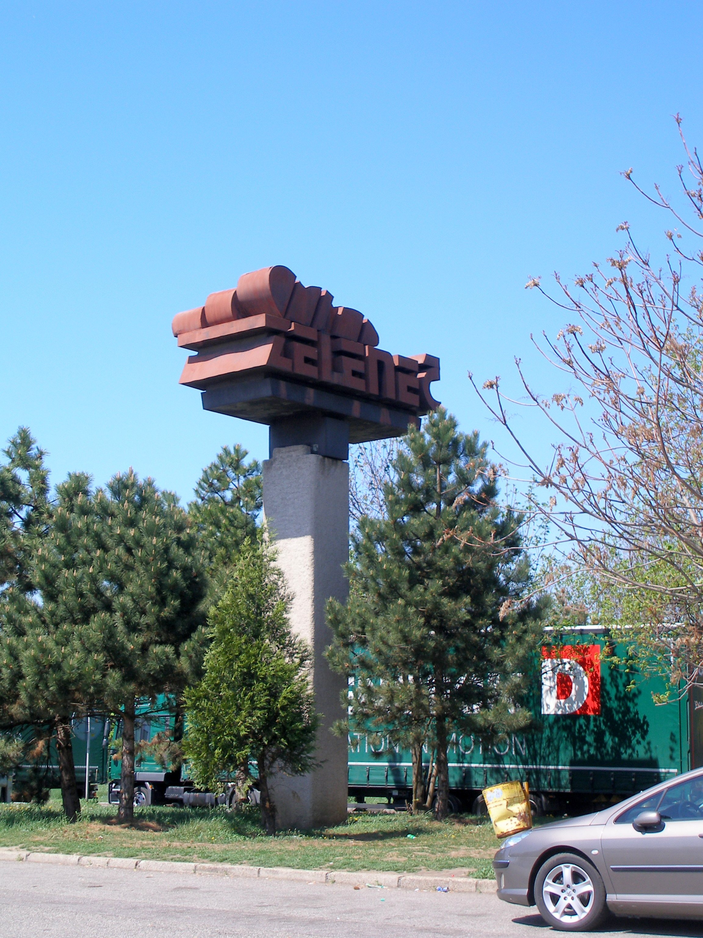 Odpočívadlo na D1 Zeleneč pri Trnave.